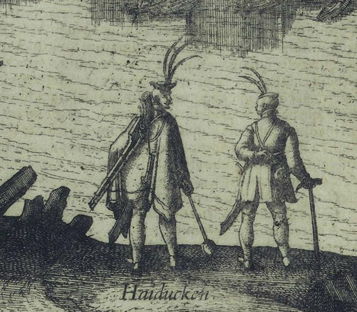 Hajdúk rajza Hoefnagel Komáromot ábrázoló metszetéről (részlet)